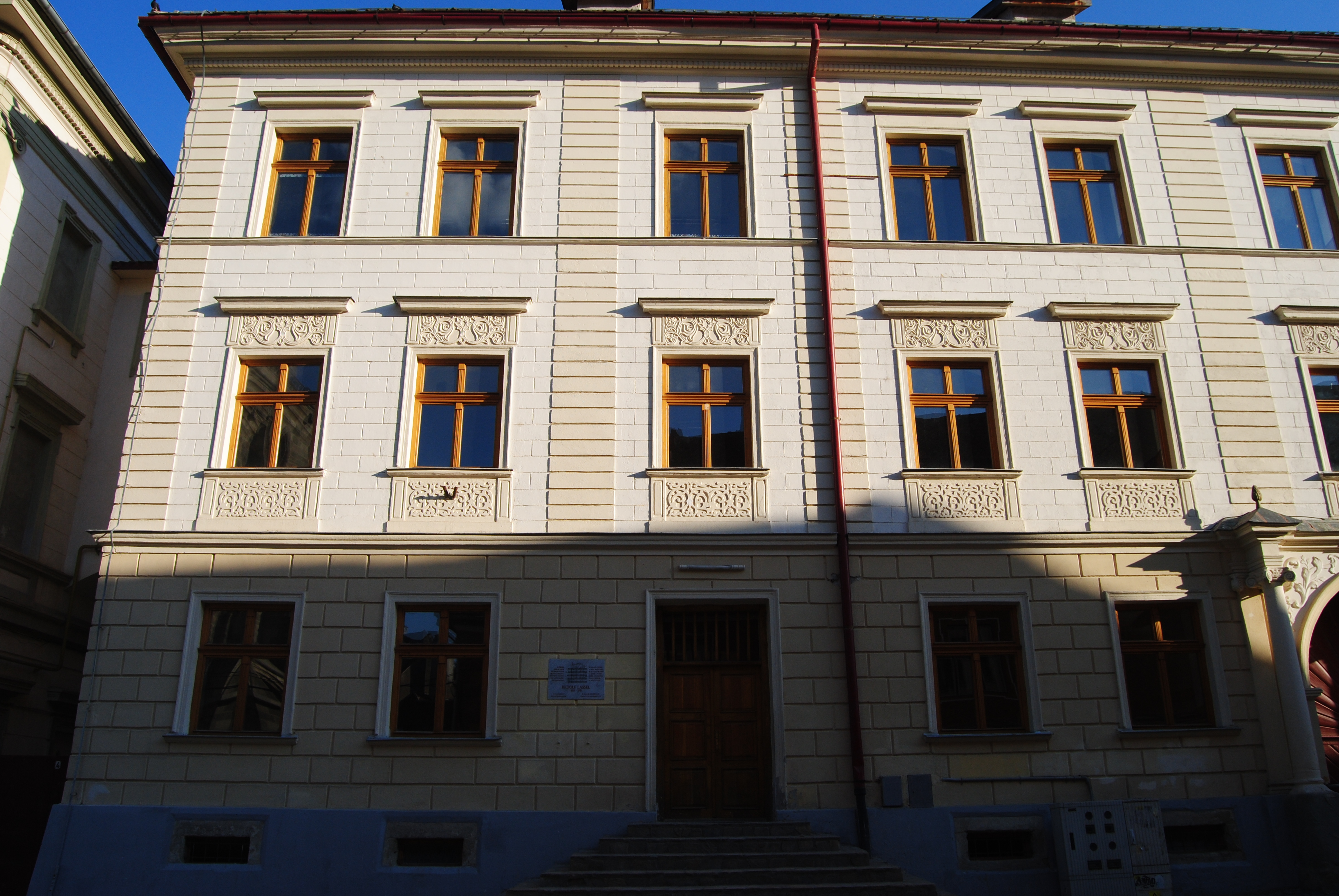 Casă, Curtea Honterus nr. 4 Brașov